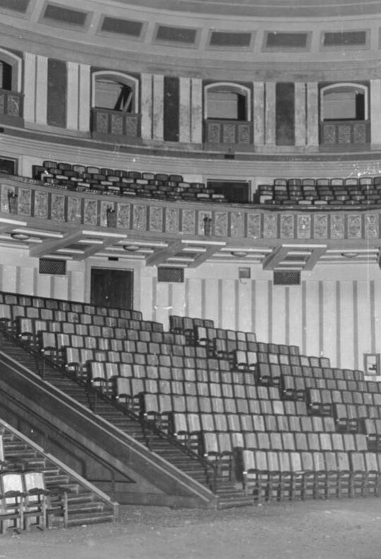 Minsk, Mai 1943 Ein Teil des Zusschauerraums der Oper in Minsk; Die Oper hat 1.500 Plätze, auffallend ist deren Anordnung. Film- und Bild-Nr..: F.R.11/24